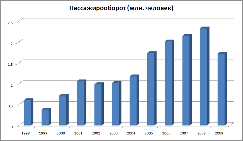 Fluggastaufkommen Flughafen Dortmund 1998-2009 (in Millionen)